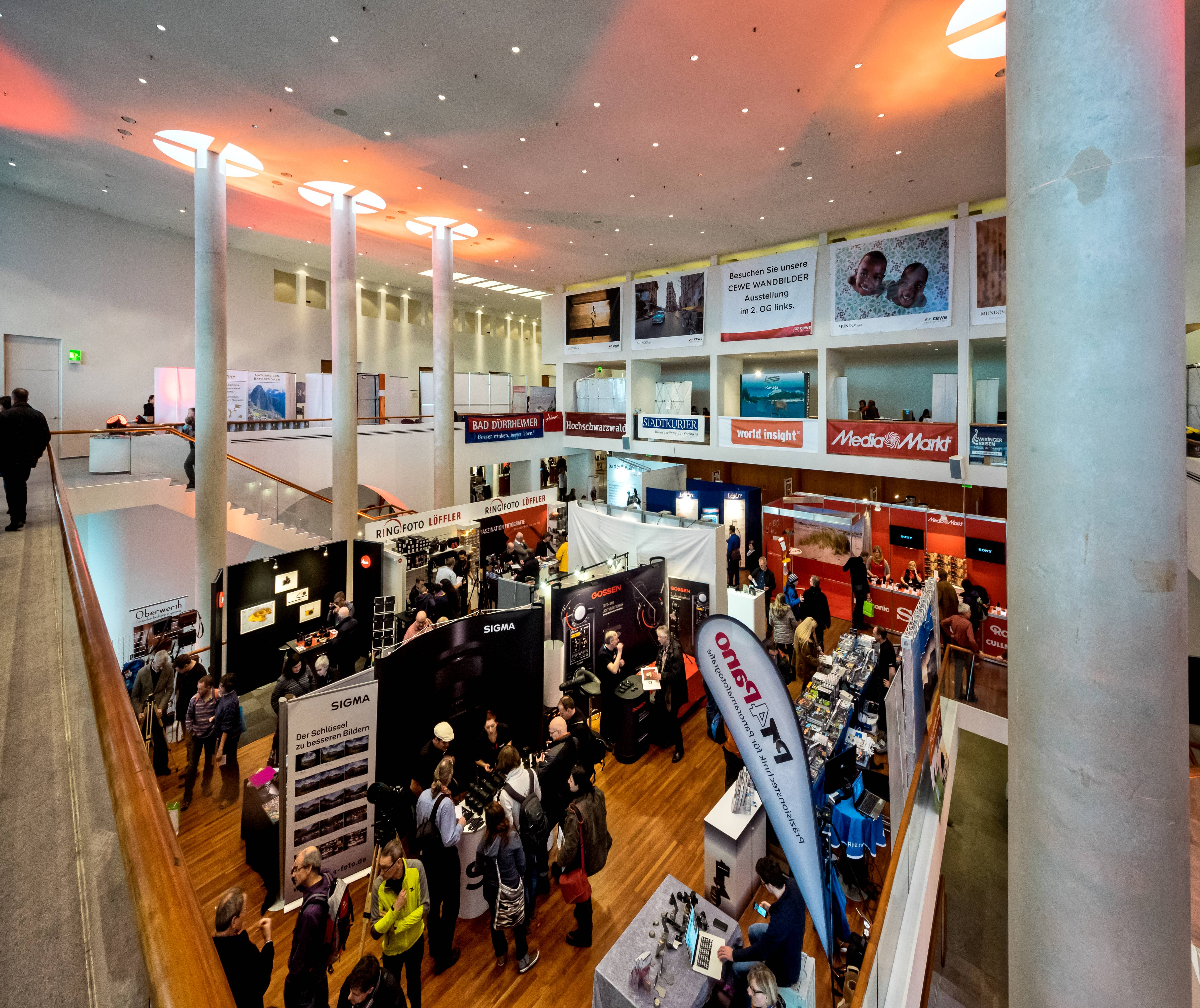 Bilder von der Mundologia 2015 Bilder von der Mundologia 2015